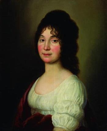 Мария Васильевна Ланская, ур. Шатилова (1767-1842), пользовалась особенной благосклонностью императрицы Марии Федоровны. Жена гофмаршала Степана Сергеевича Ланского (1760-1843).